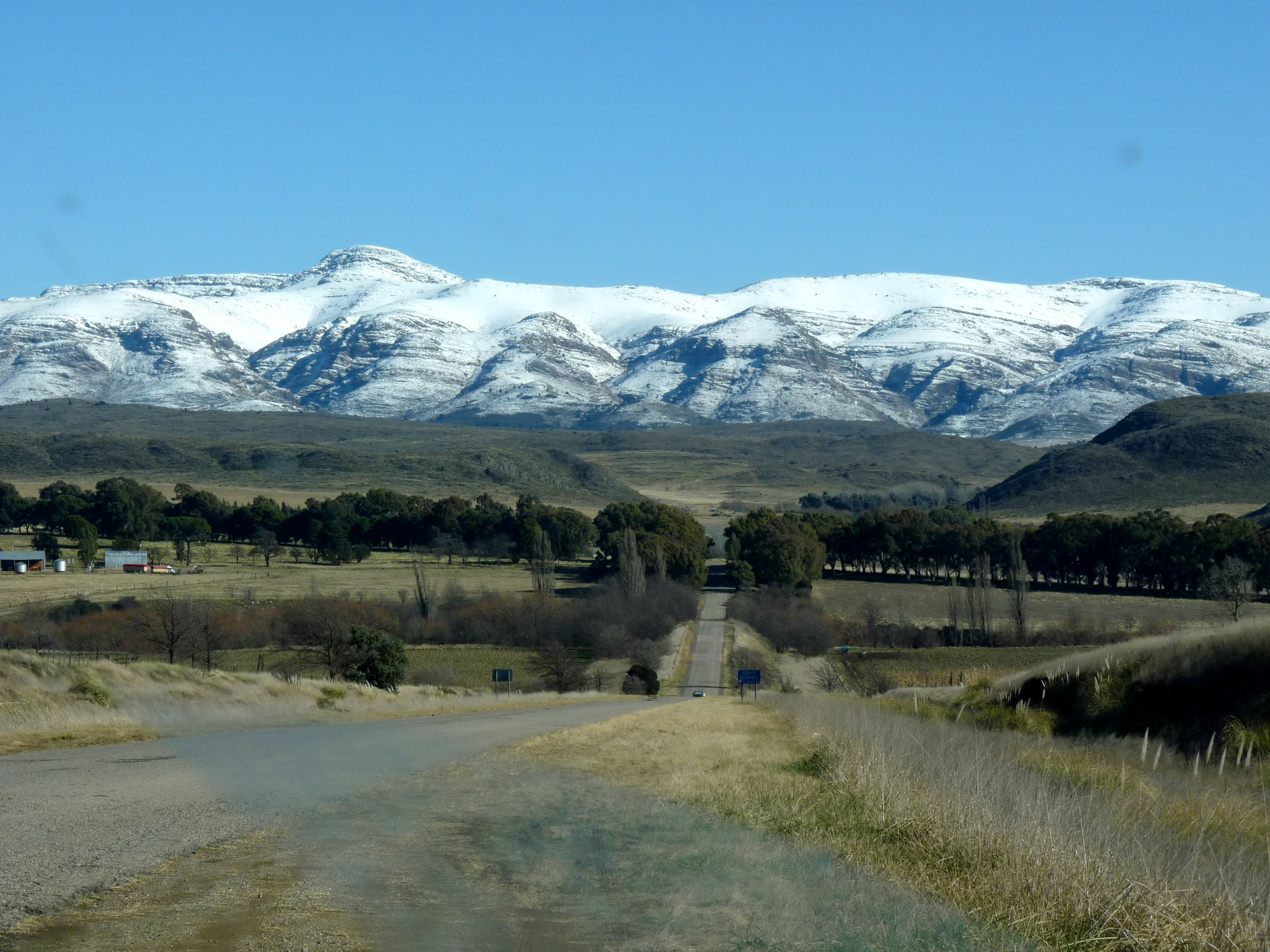 Tornquist Partido, Buenos Aires Province, Argentina